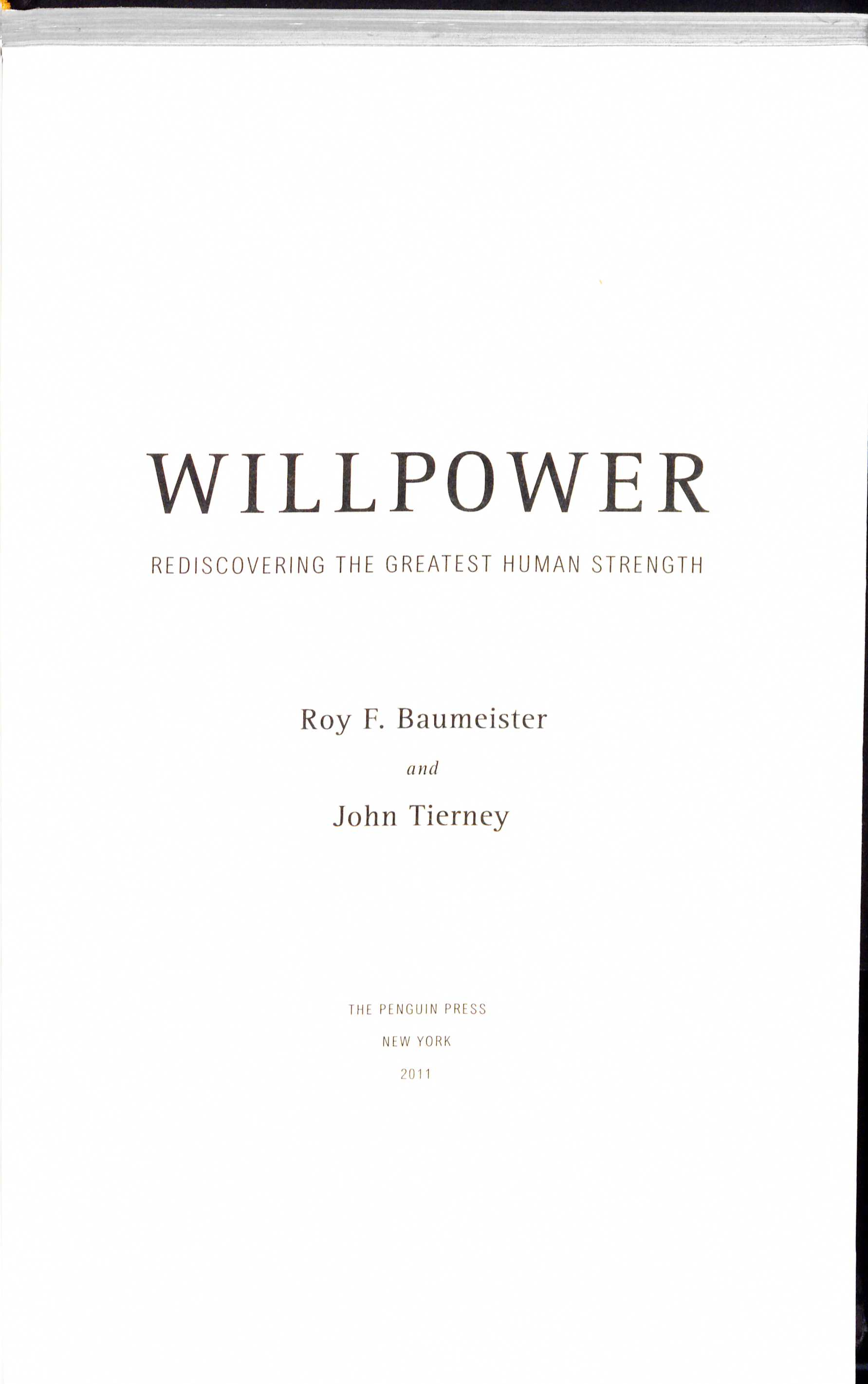 Roy F. Baumeister, John Tierney Willpower 2011 title